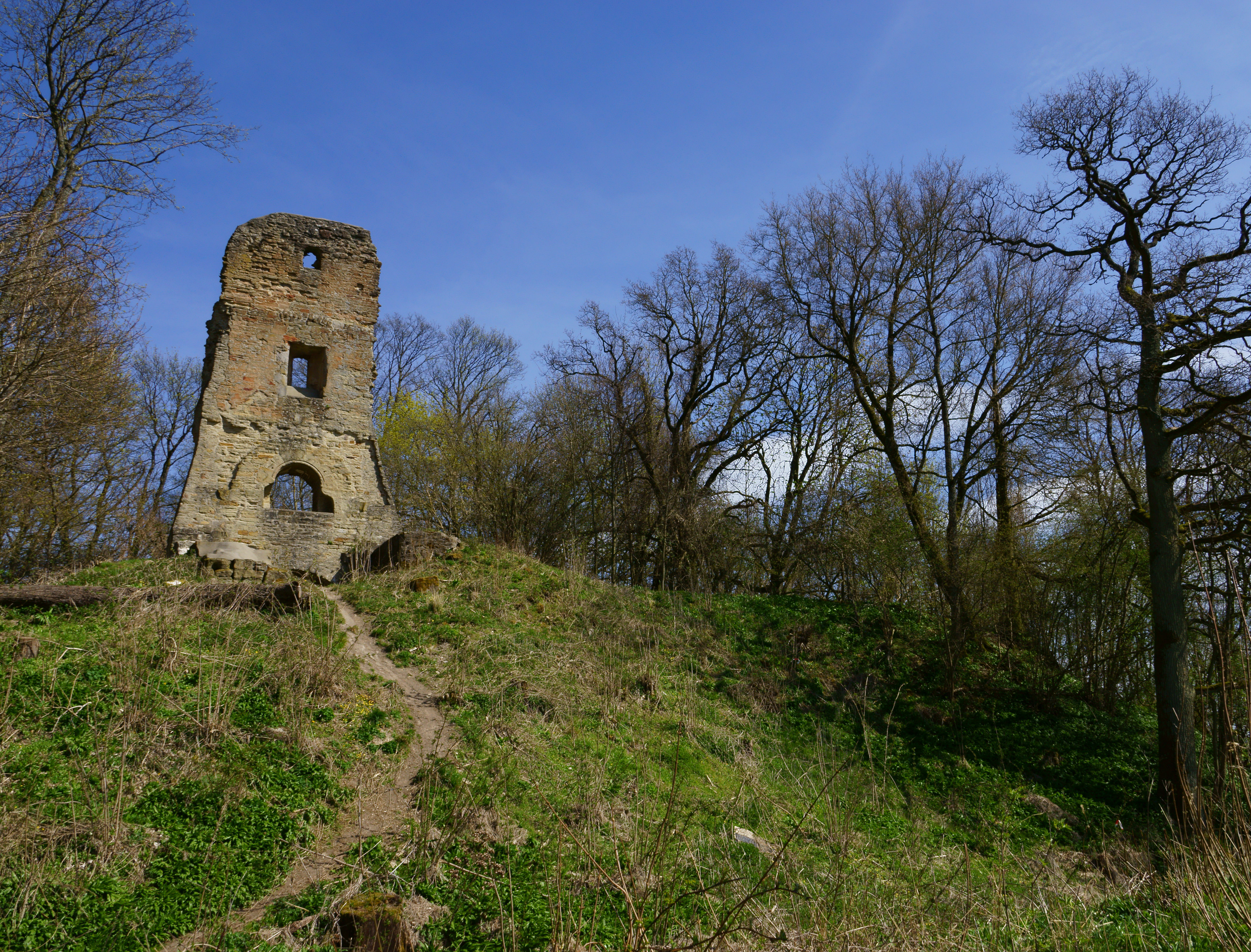 Die Burgruine Speckfeld im Naturschutzgebiet „Schloßbergsattel bei Markt Einersheim“ (NSG-00612.01), Markt Einersheim, Landkreis Kitzingen, Bayern